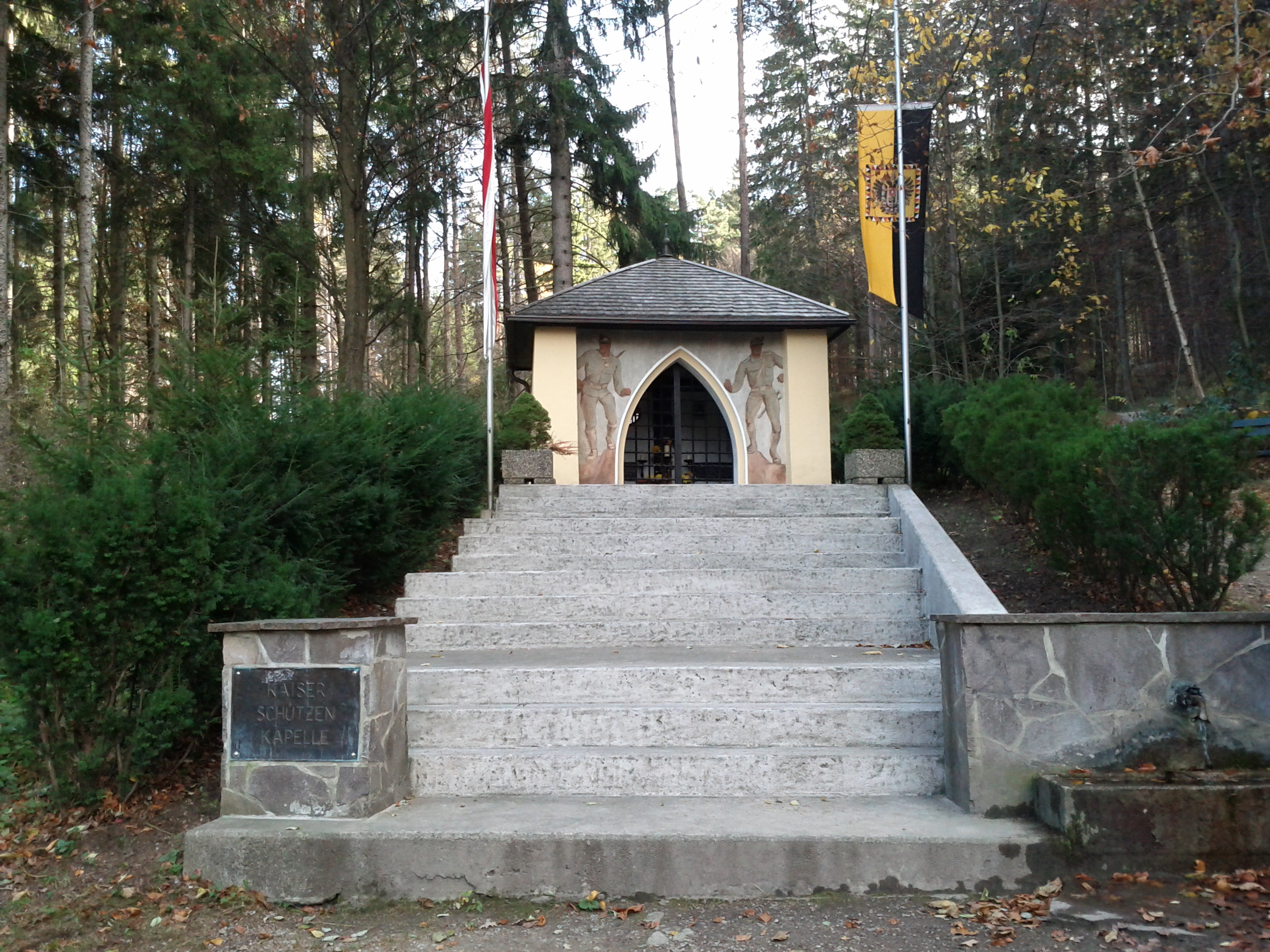 Kaiserschützenkapelle - Tummelplatz, Amras This media shows the remarkable cultural object in the Austrian state of Tyrol listed by the Tyrolean Art Cadastre with the ID 42028. (on tirisMaps, pdf, more images on Commons)